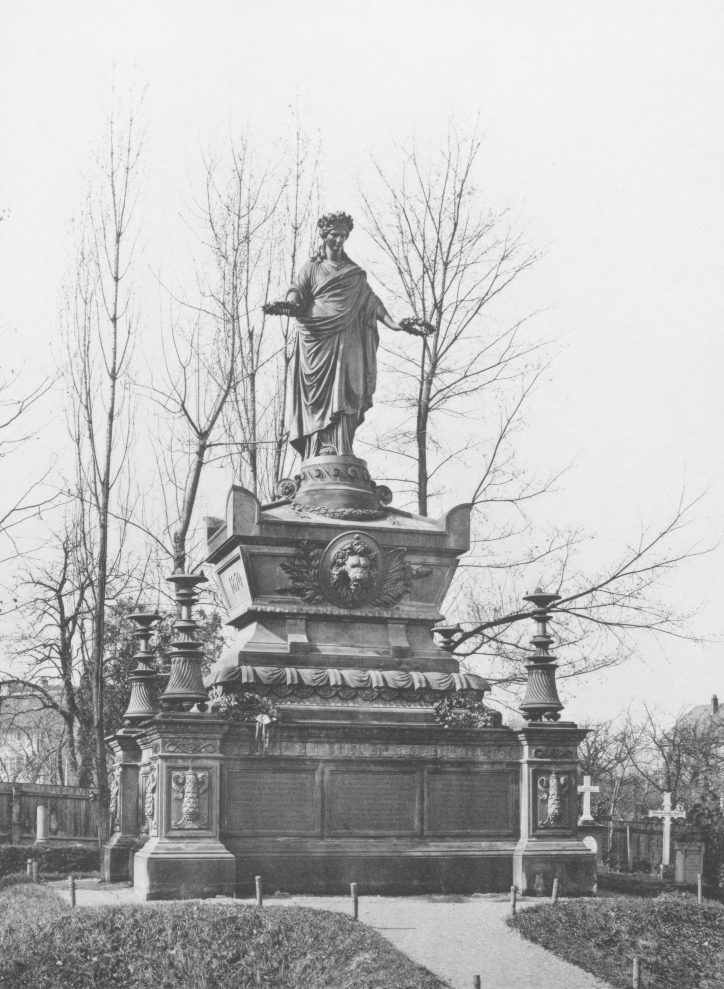 Stuttgart, Fangelsbachfriedhof, Kriegerdenkmal für 124 Gefallene des Deutsch-Französischen Kriegs 1870/1871, Architektur von Adolf Gnauth, Germania-Statue von Ernst Rau, Löwenkopfmaske von Friedrich Specht, 1874, im Zweiten Weltkrieg zerstört (?), durch ein „Mahnmal“ ersetzt, die Originale oder Nachbildungen (?) von sieben der ursprünglichen Gedenkplaketten von den Seitenwänden des Piedestals wurden auf Liegesteinen vor dem Mahnmal angebracht.